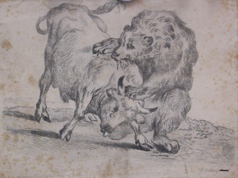 Ein Stier von einem Bären angefallen. Weichgrundätzung auf festem Bütten. Blgr. 19,8 x 26,4 cm. In der Platte signiert (Zusatz gestrichen).